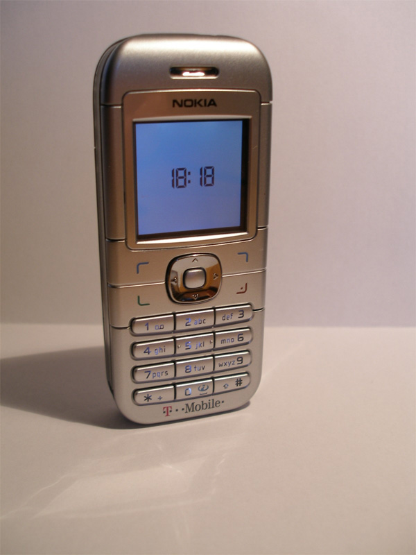 Nokia 6030